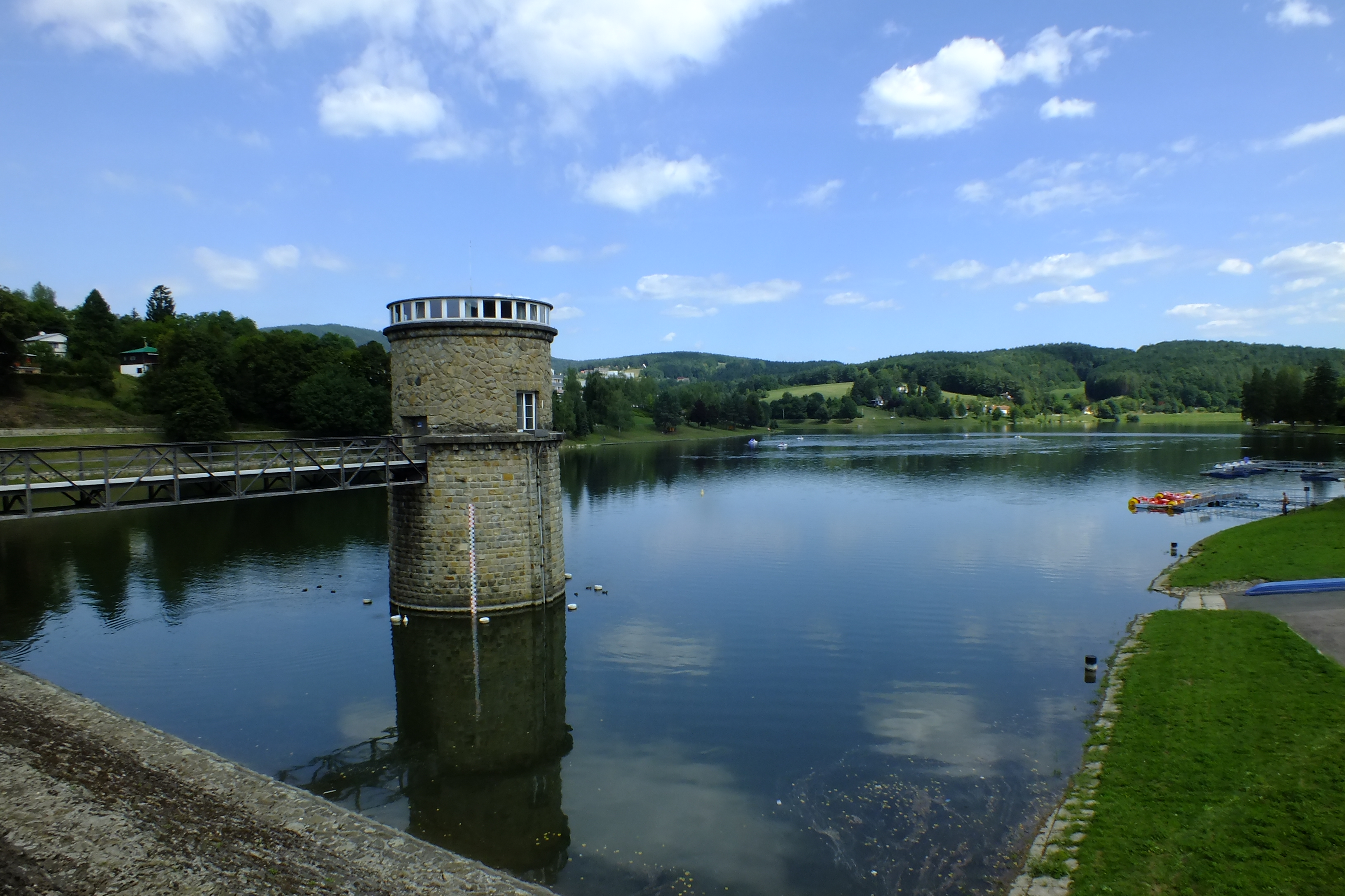 Pohled na přehradu z hráze